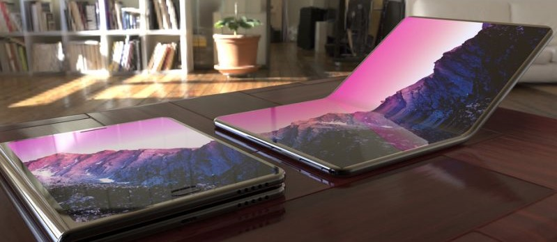 Painduv OLED ekraan